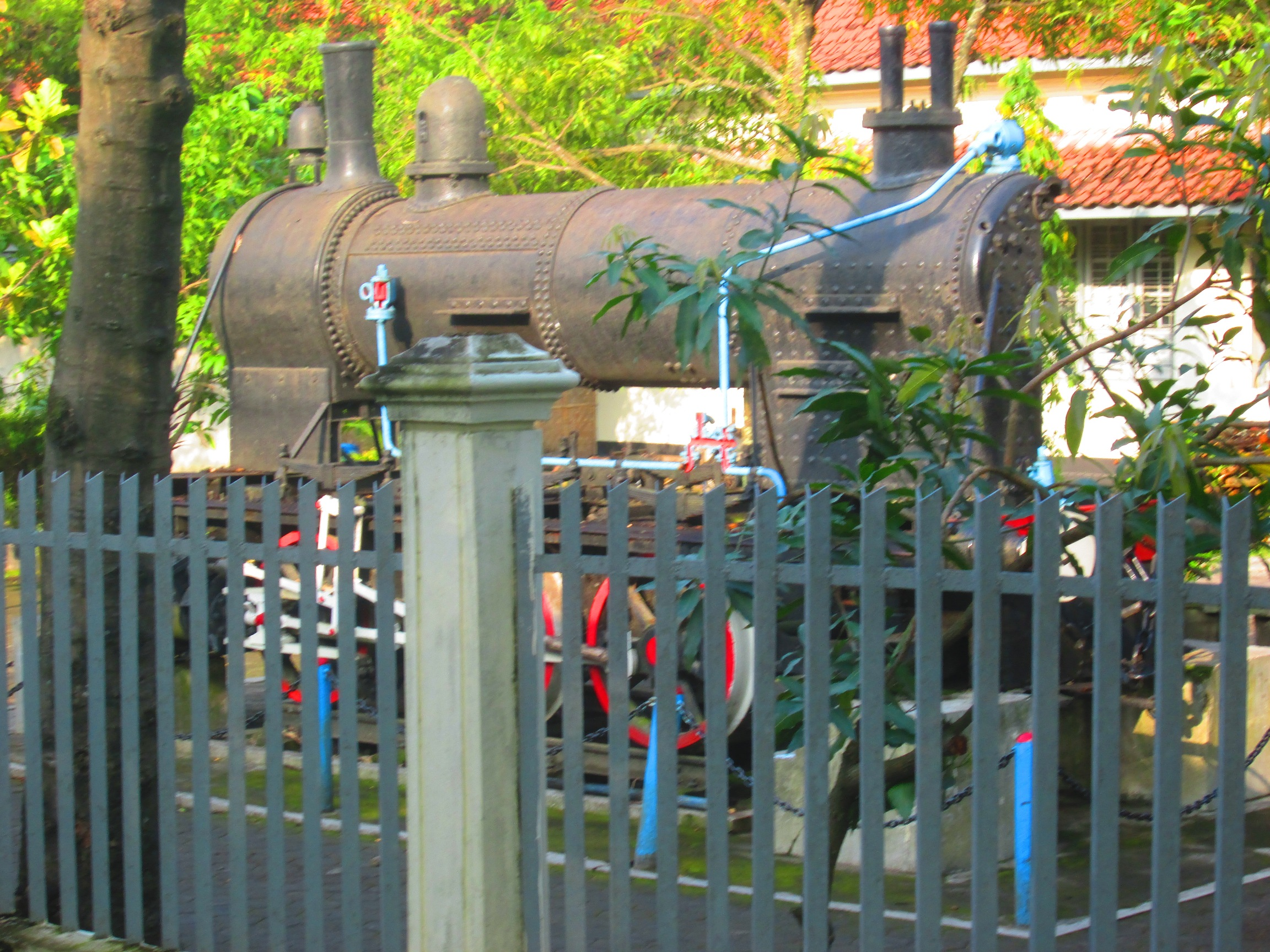 Lokomotif NIS 107 di depan SMK Negeri 2 Yogyakarta.